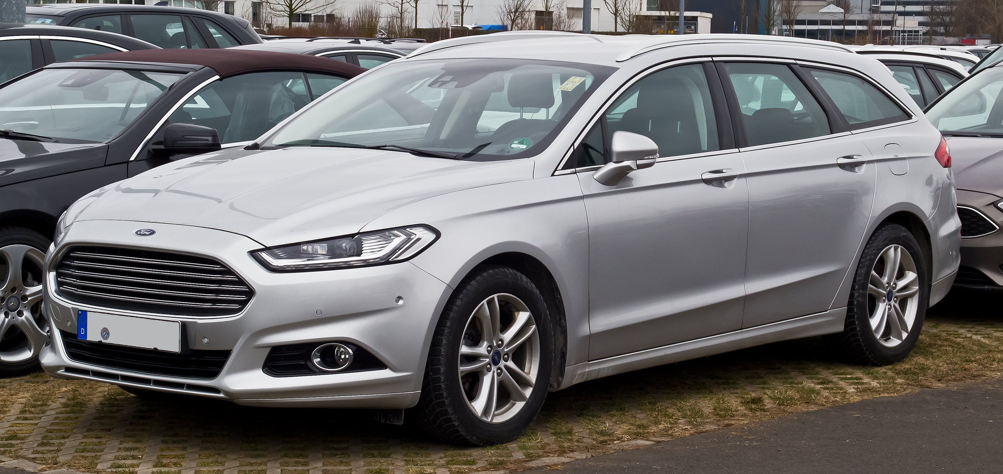 Ford Mondeo Turnier (V)